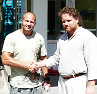 «J'ai déjà lu le manuscrit de ce livre écrit par l'exceptionnel maître d'arts martiaux, Valeriy Maistrovoy. Je recommande ce livre parfait non seulement aux passionnés des arts de combat, mais aussi à tous ceux qui veulent en savoir plus sur la vraie Russie.»